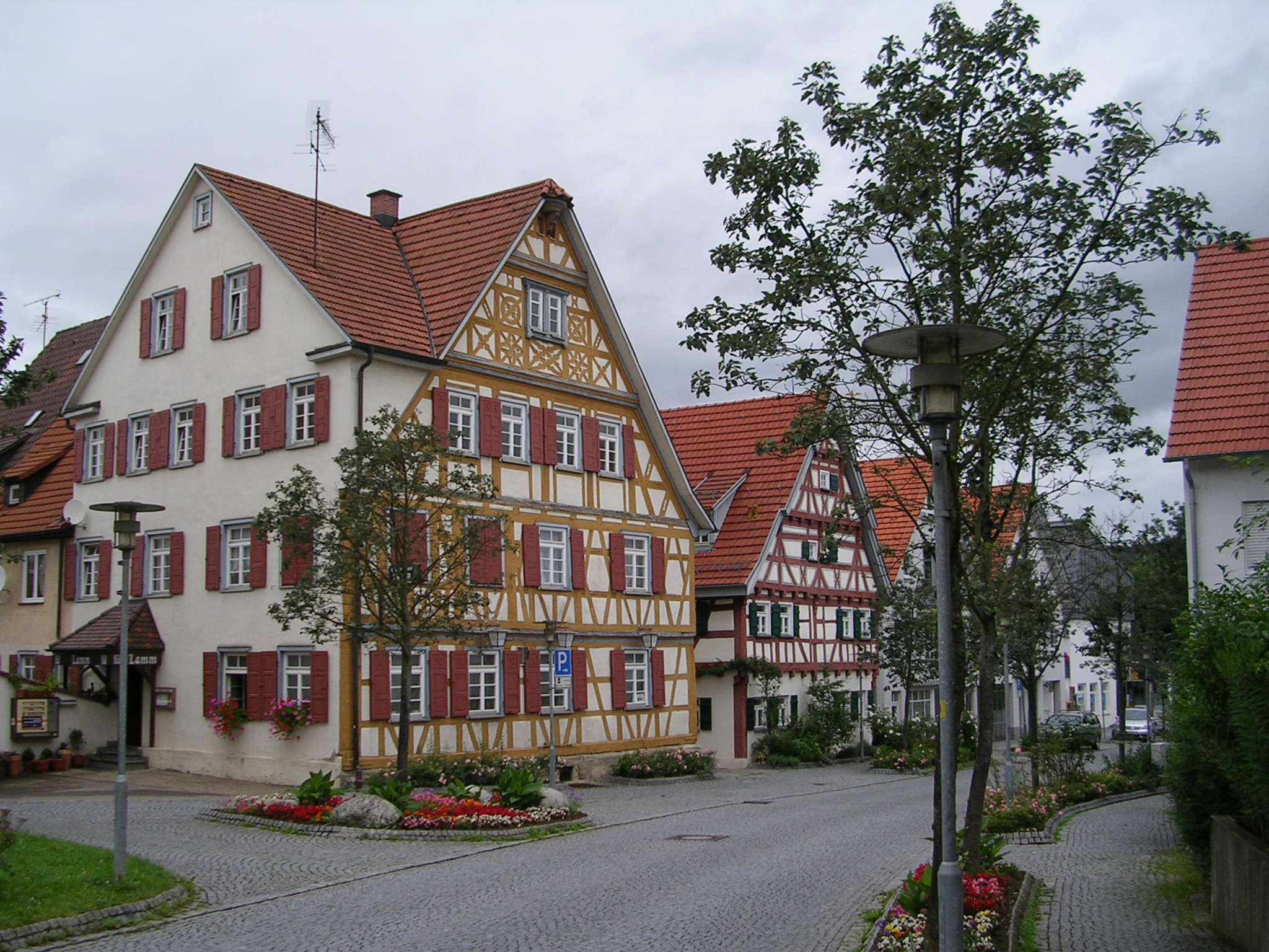 Marktstrasse in Deizisau (market street, Deizisau, Germany)